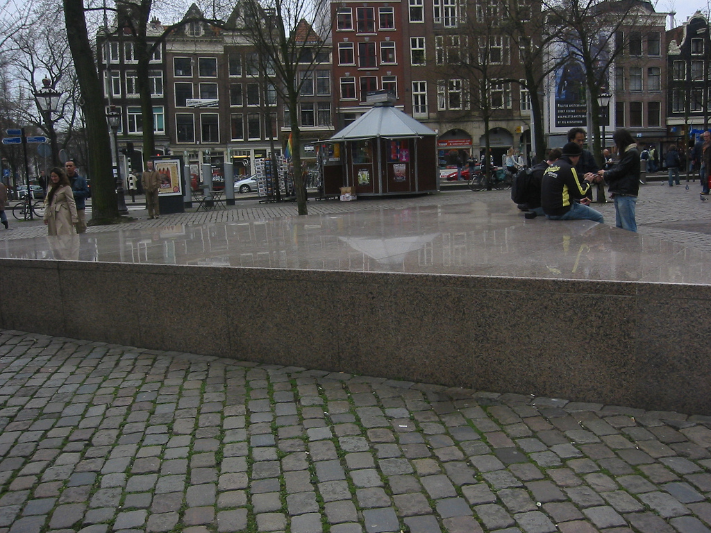 Homomonument, Amsterdam